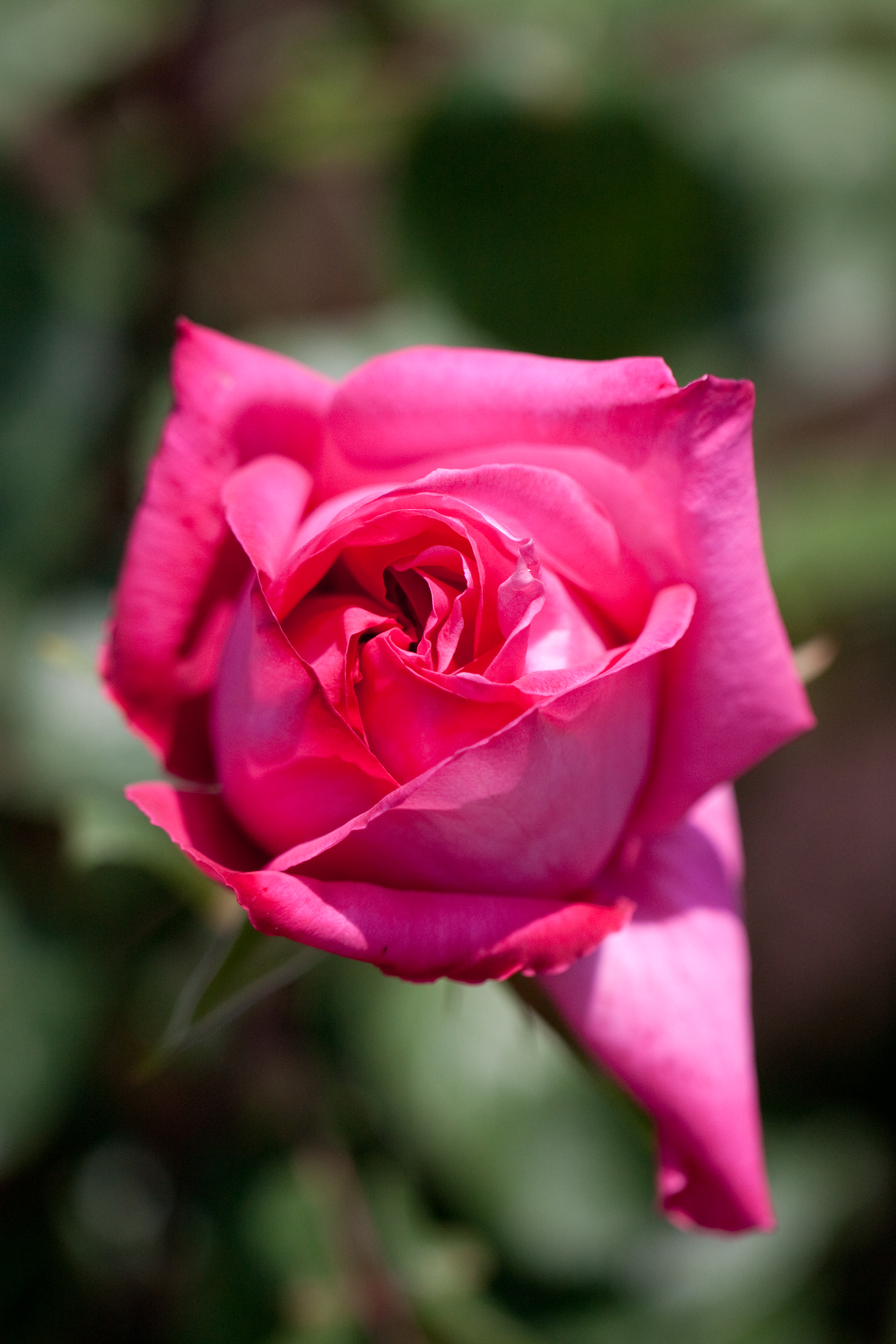 Rose 'Montesquieu'. モンテスキュー。